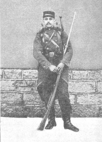 Ciclista francés Lucien Petit-Breton con el uniforme de soldado durante la Primera Guerra Mundial